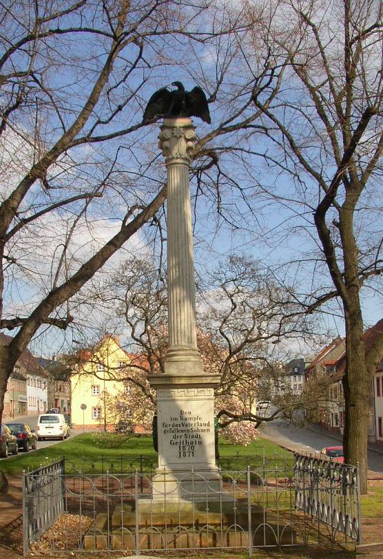 Das Geithainer Kriegerdenkmal für die, im deutsch-französischen Krieg, gefallenen Bürger der Stadt